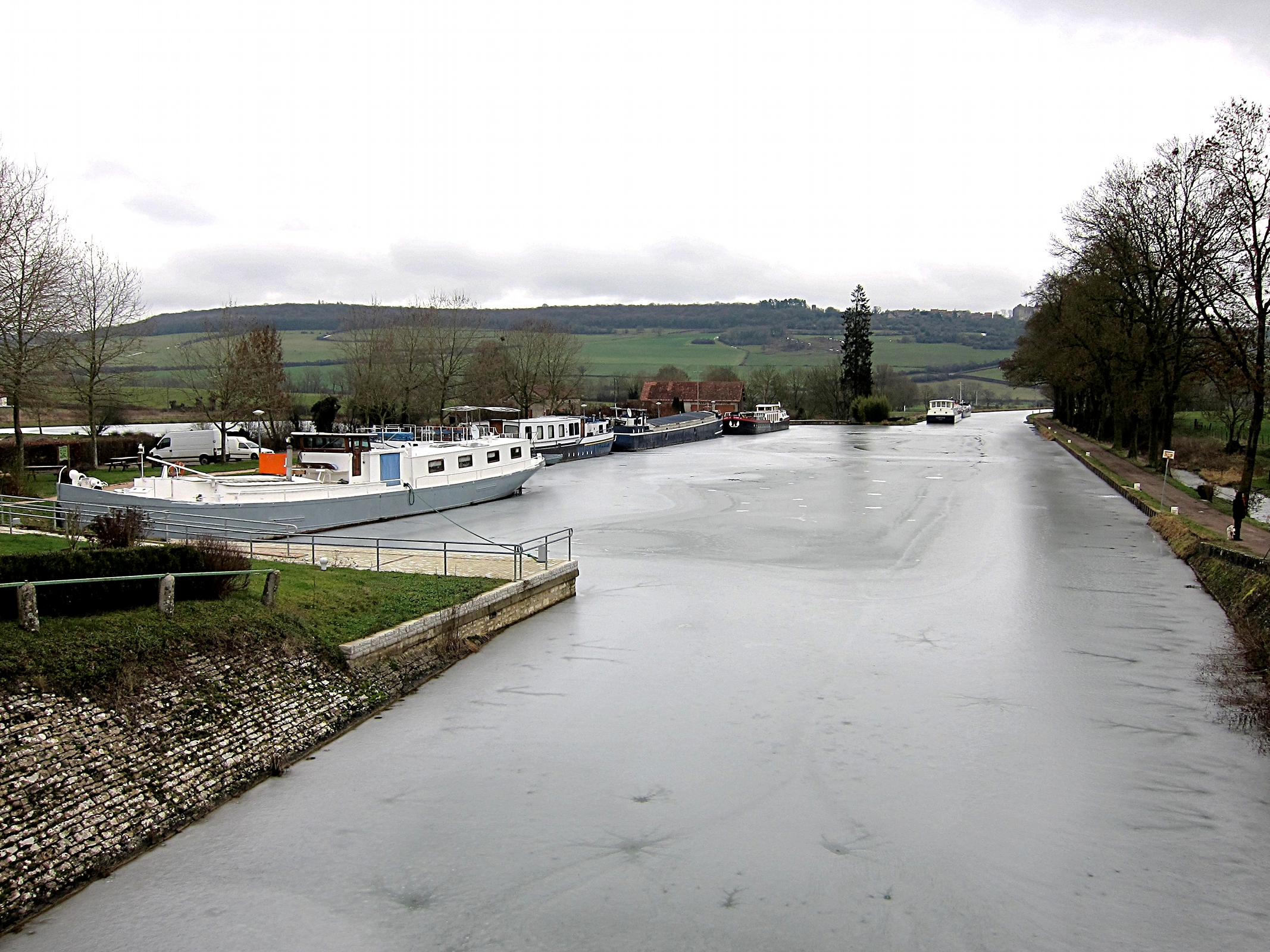 Le canal de Bourgogne au port de Vandenesse-en-Auxois (Côte-d'Or). 23 décembre 2009 : couche de glace sur l'eau.